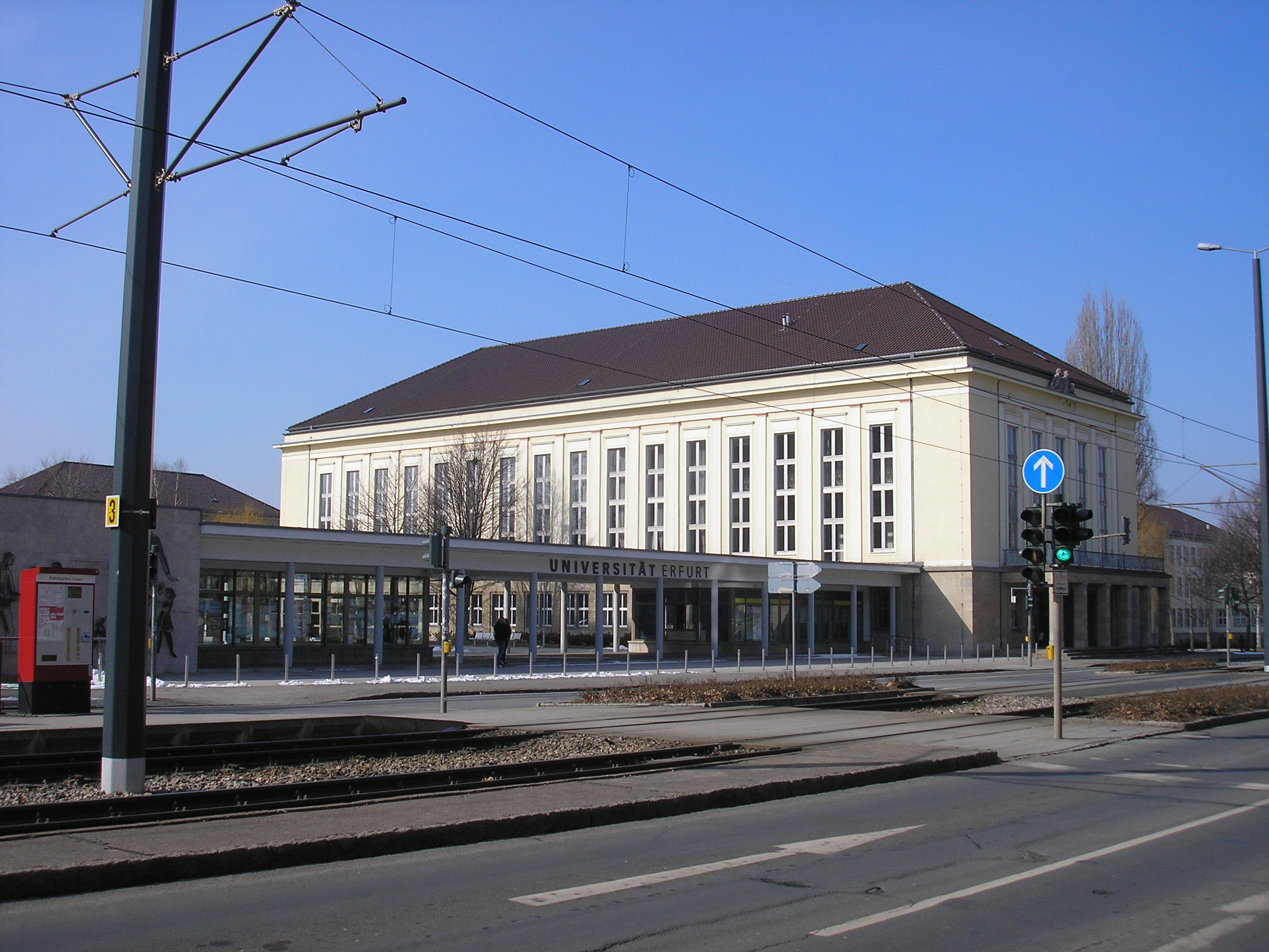 Das Gebäude des Audimax der Universität in Erfurt.